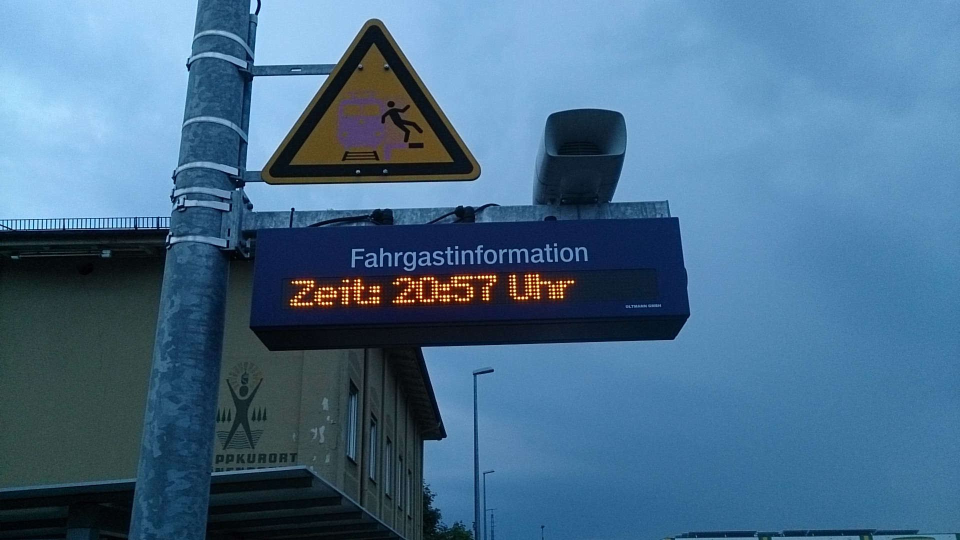 Informační LED dsplej, na německém vlakovém nádraží, ve městě Thal, Markt - Bad Grönenbach.